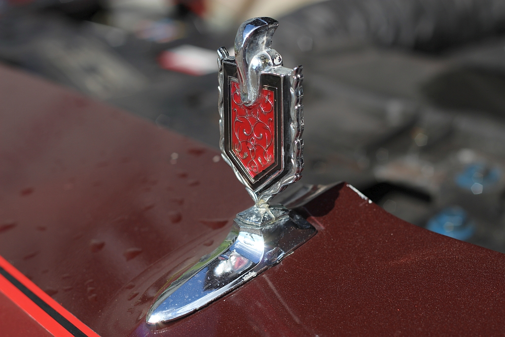 1979 Chevrolet Monte Carlo, 26.9.2015